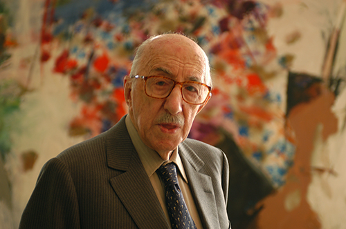 Portrait de Paul Facchetti (1912-2010) chez lui à Paris devant un tableau de l'un de ses artistes, Ger Lataster.